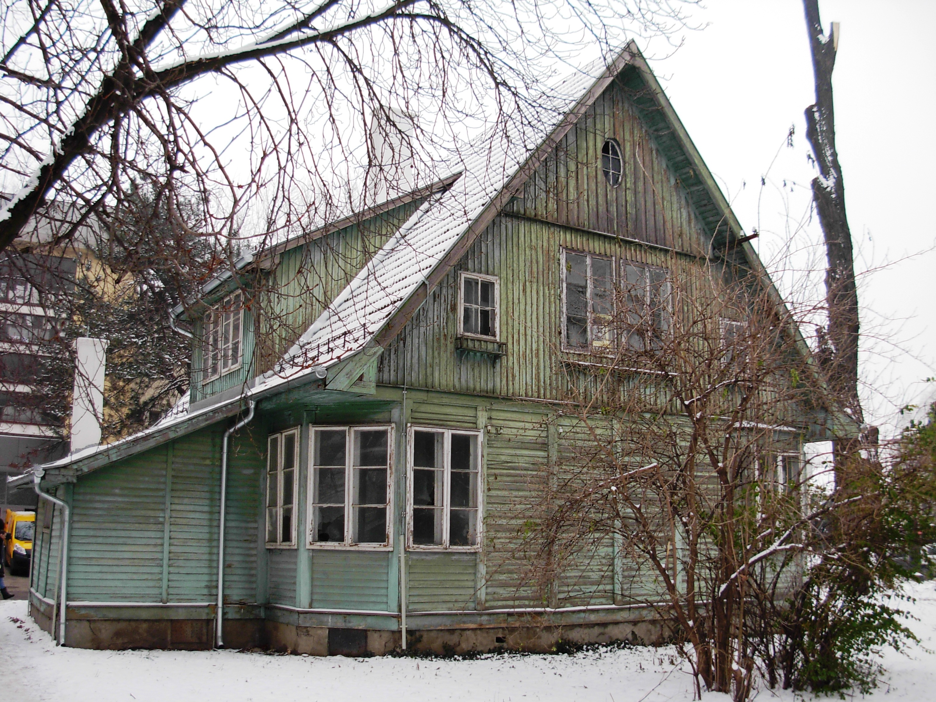 Kuća u kojoj je živeo dr Adolf Hempt. Nalazi se pored zgrade Pasterovog zavoda u Novom Sadu, u okviru kompleksa Kliničkog centra Vojvodine. To je jedini sačuvani objekat iz grupe tzv. „Dekerovih baraka“ dobijenih od Nemačke posle Prvog svetskog rata.